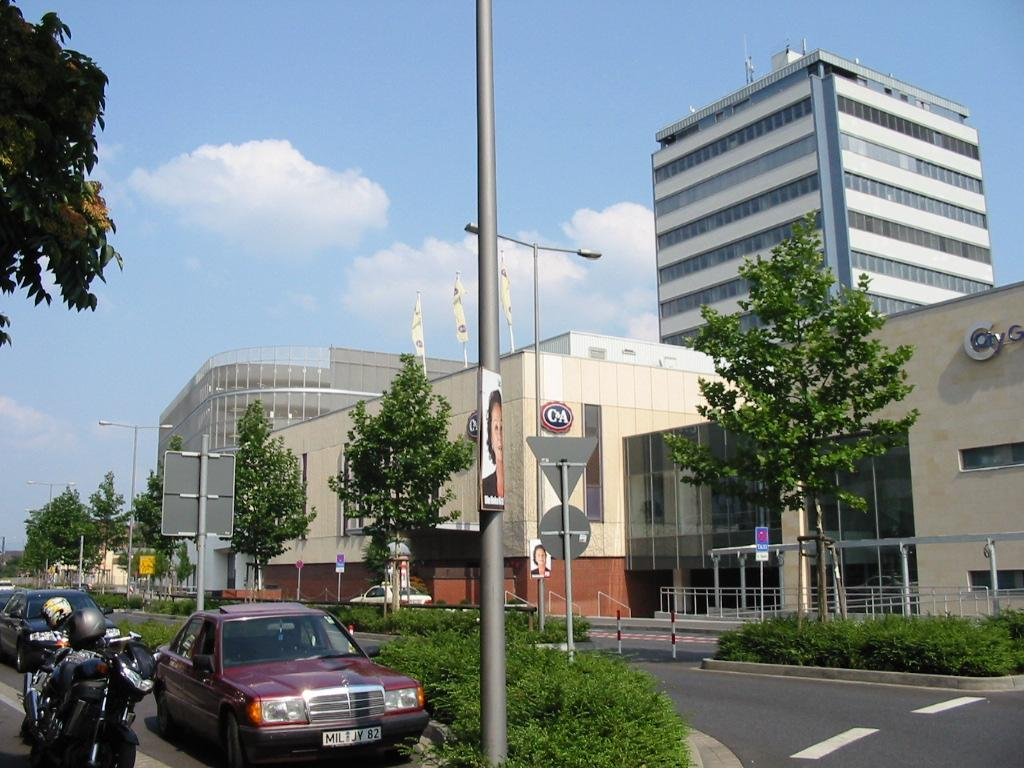 Die City Galerie in Aschaffenburg ist ein großes Einkaufszentrum mit vielen Läden. Sie befindet sich an der Goldbacher Straße, gleich neben dem Park Schöntal.